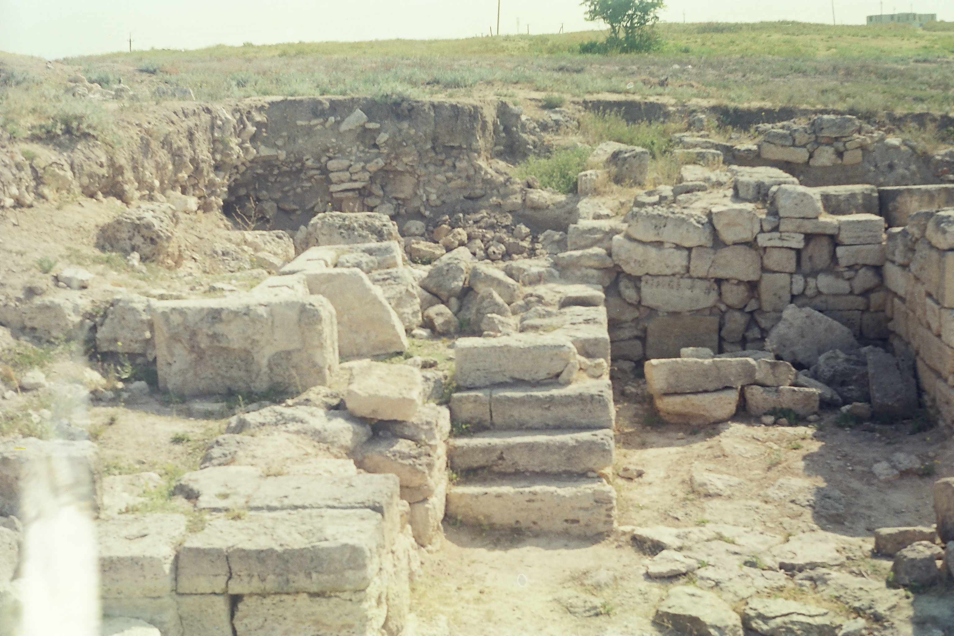 Калос Лимен. Внутри крепости. Вид на лестницу.